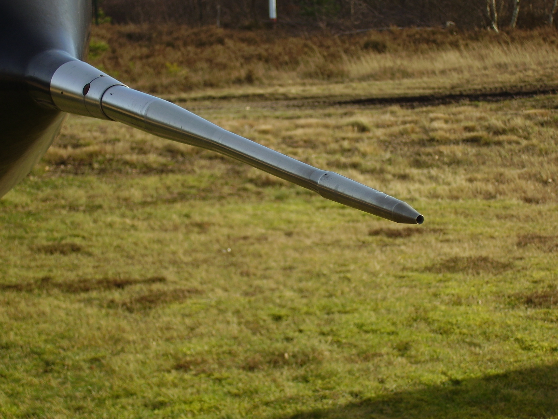 Aeronauticum in Nordholz, Luftschiffe, Zeppelin, bei Cuxhaven, Luftfahrtmuseum